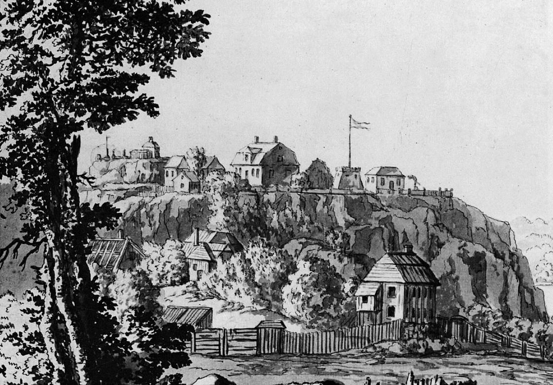 Paschs malmgård 1764. "Vue de Paschens Fåfänga", lavering av Jacob Philipp Hackert (1737-1807), 1764. På rokokomanér trängde han ihop perspektivet så att den Wertmüllerska malmgården i förgrunden verkar att ligga alldeles nedanför klippan i stället för bortåt nuvarande Roslagsgatan. Den tyske konstnären Jacob Philipp Hackert gästade Stockholm 1764.